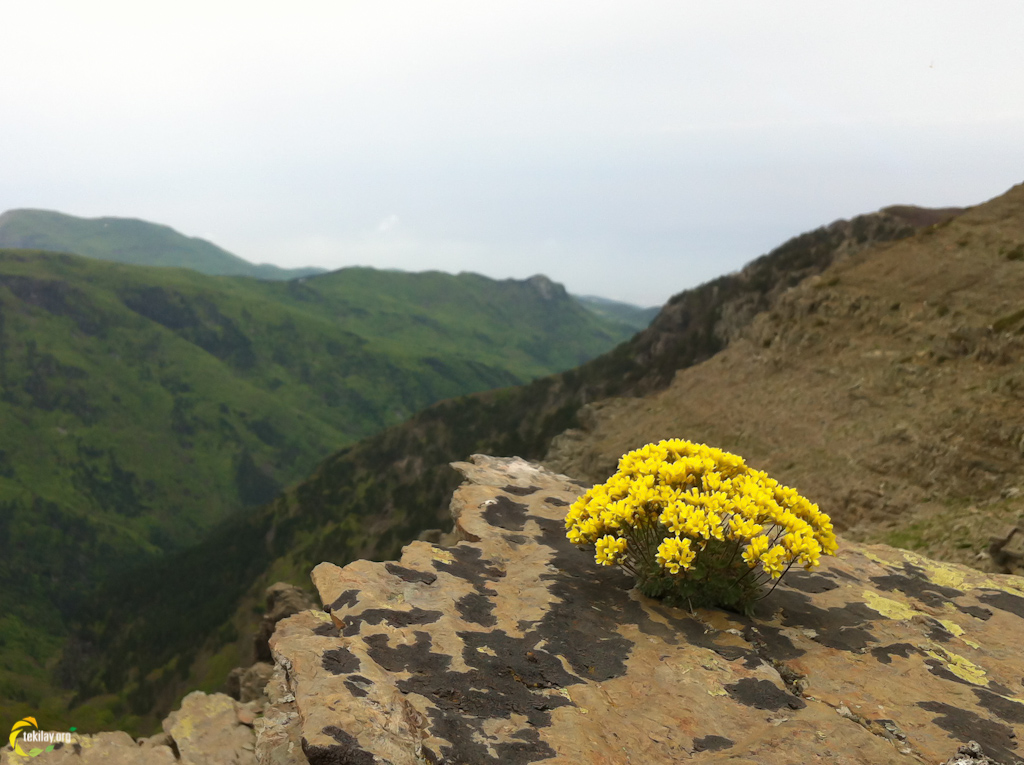 Amanos Dağları, Hatay il sınırı içerisinde endemik bir Kayadolaması cinsi bitki türü.